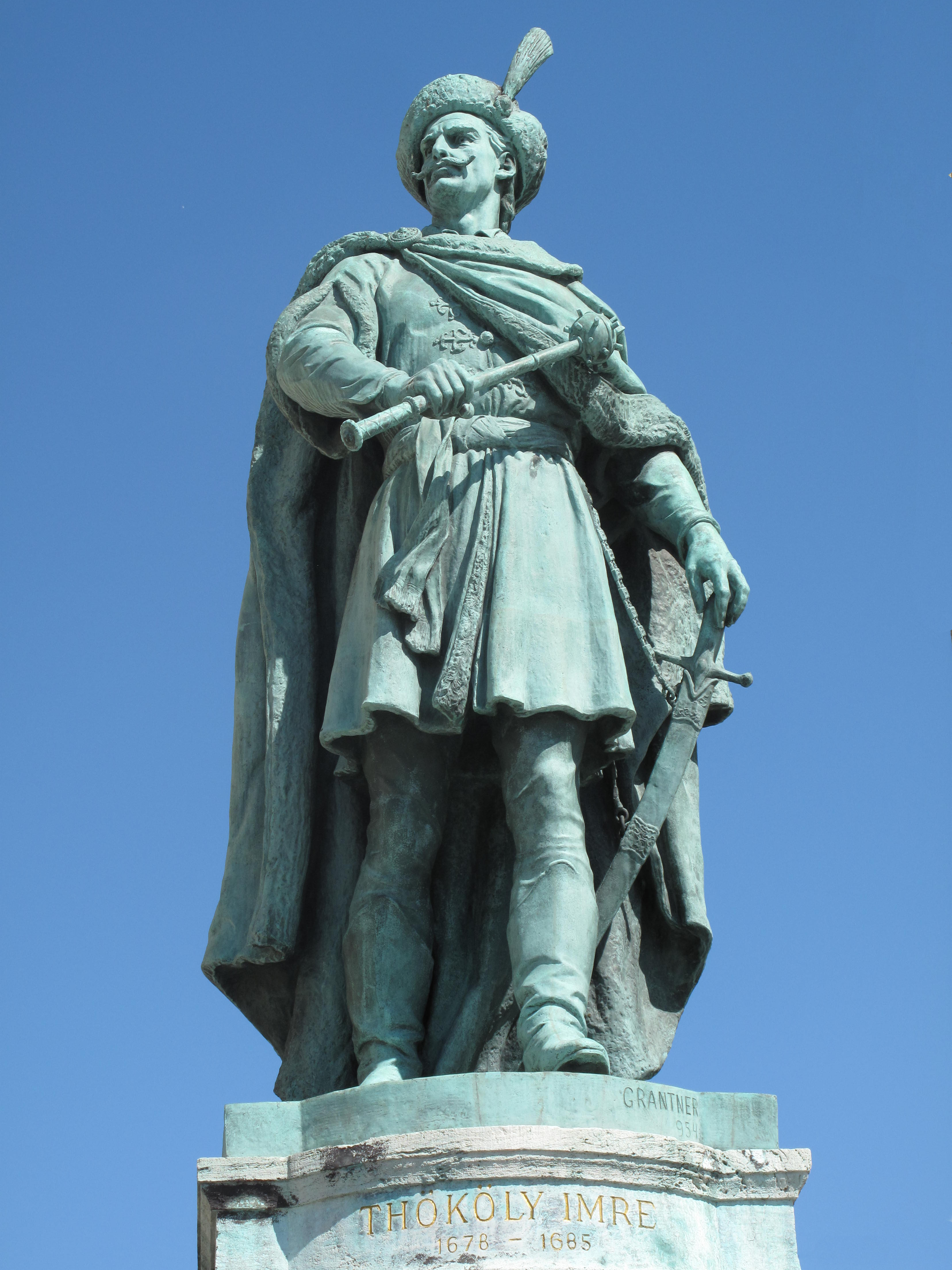 Náměstí Hrdinů, Budapešť